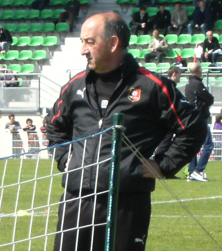 Photo prise lors d'un entraînement du Stade rennais au stade de Marville de Saint-Malo le 3 mai 2013. L'entraîneur adjoint Jean-Marie De Zerbi.